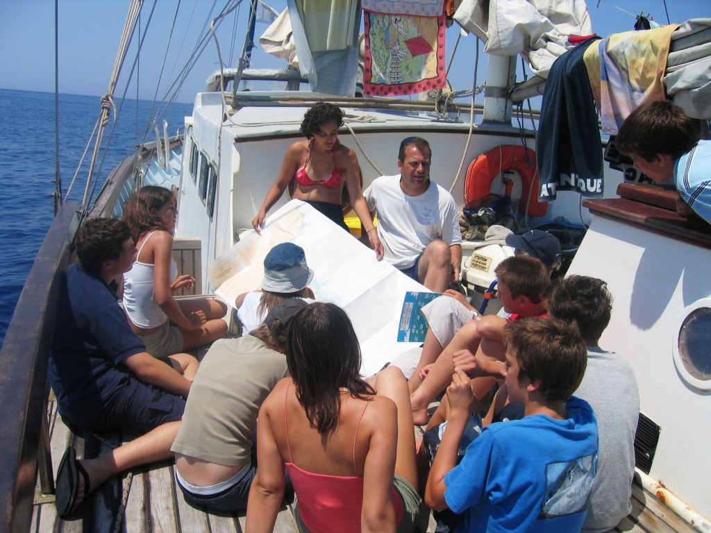 Photo prise lors d'un atelier mer de la SCS pour les jeunes